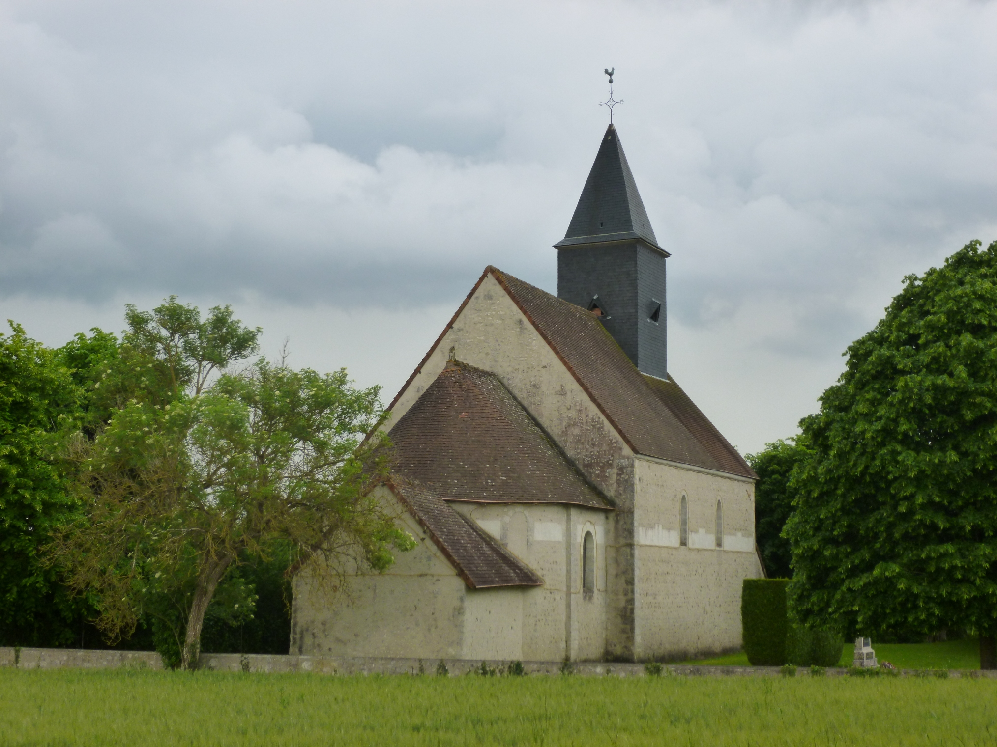 Eglise de Marcilly-en-Beauce